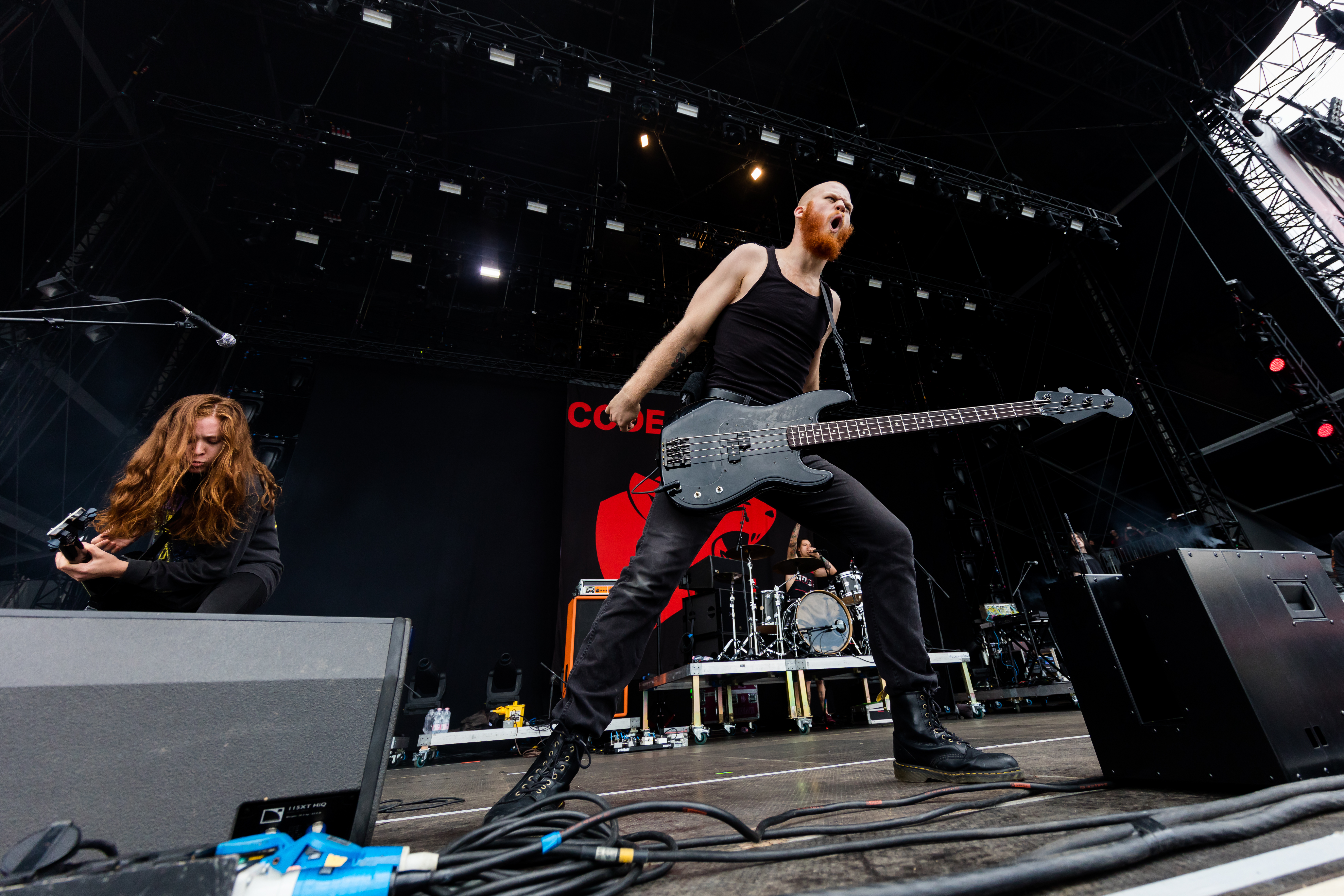 Code Orange during Rock am Ring at Nürburgring, Nürburg, Rheinland Pfalz, Germany on 2017-06-04, Photo: Sven Mandel